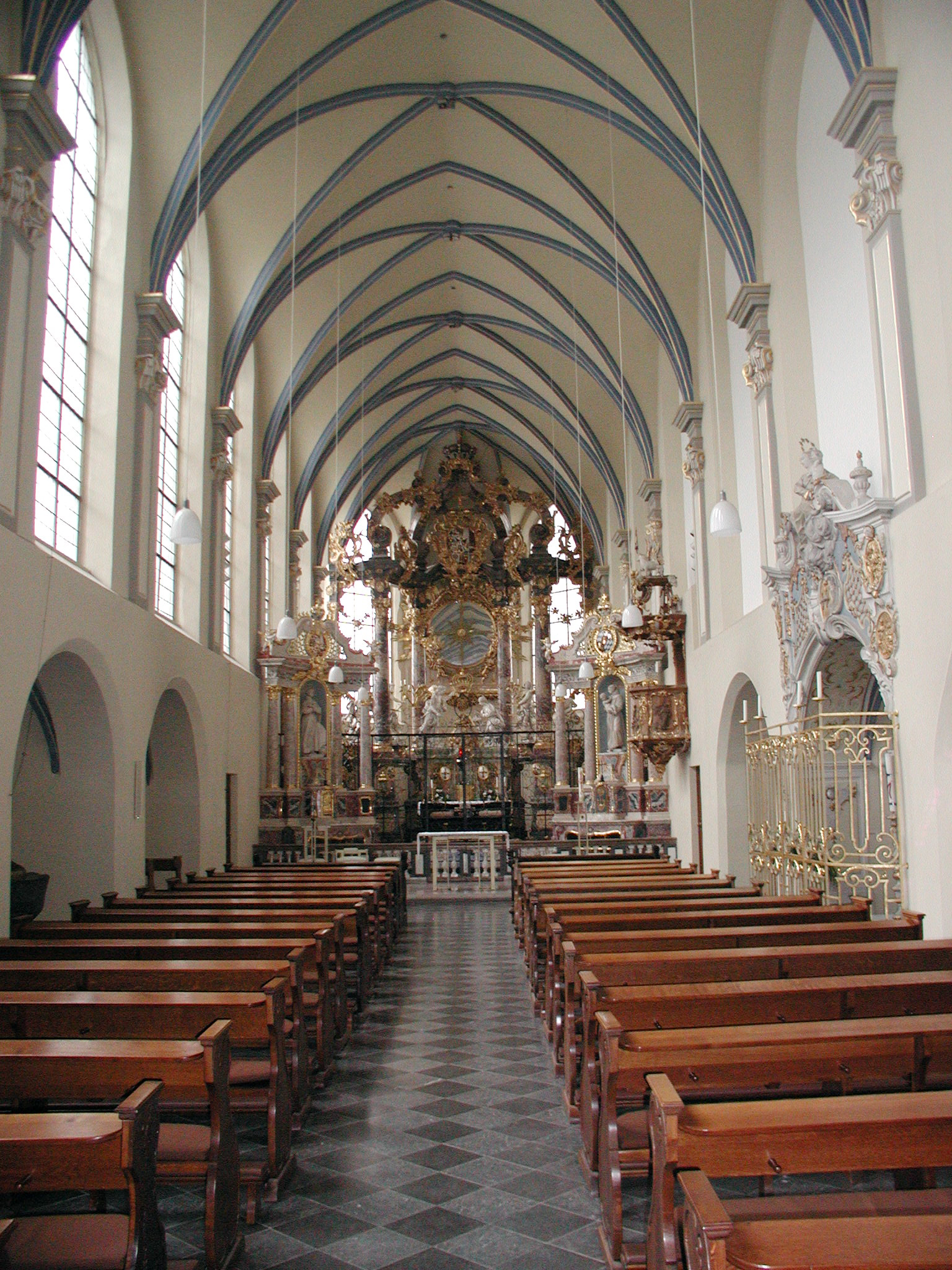 Brühl, Schlosskirche